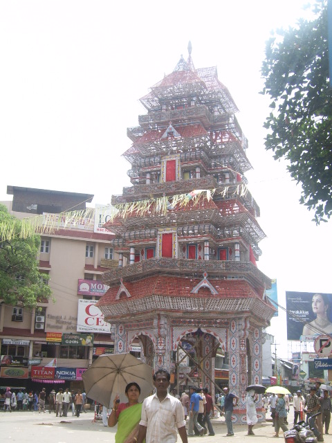 പന്തൽ - മണികണ്ഠനാൽ - തൃശ്ശൂർ പൂരം